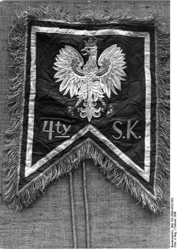 Erbeutete polnische Standarte Im Berliner Zeughaus wird in Kürze die Standarte des 4. polnischen Schützenregiments [4ty S.K.] zu Pferde ausgestellt, ein Beutestück, das eine besonders interessante Geschichte hat. Ein Unteroffizier, der dem Traditions-Regiment, des ehemaligen Kaiser-Franz-Garde-Grenadier-Regiments angehört, hatte diese Standte erbeutet, als polnische Reiter ihn und seine Feldwache an der Bzura angriffen. Im Verlauf des Kampfes verteidigte er sich allein gegen eine Übermacht von 15 polnischen Reitern und hielt kaltblütig stand, bis er von seinem Kameraden entlastet wurde. UBz.: die erbeutete polnische Standarte. Scherl Bilderdienst, Berlin 27.2.1940